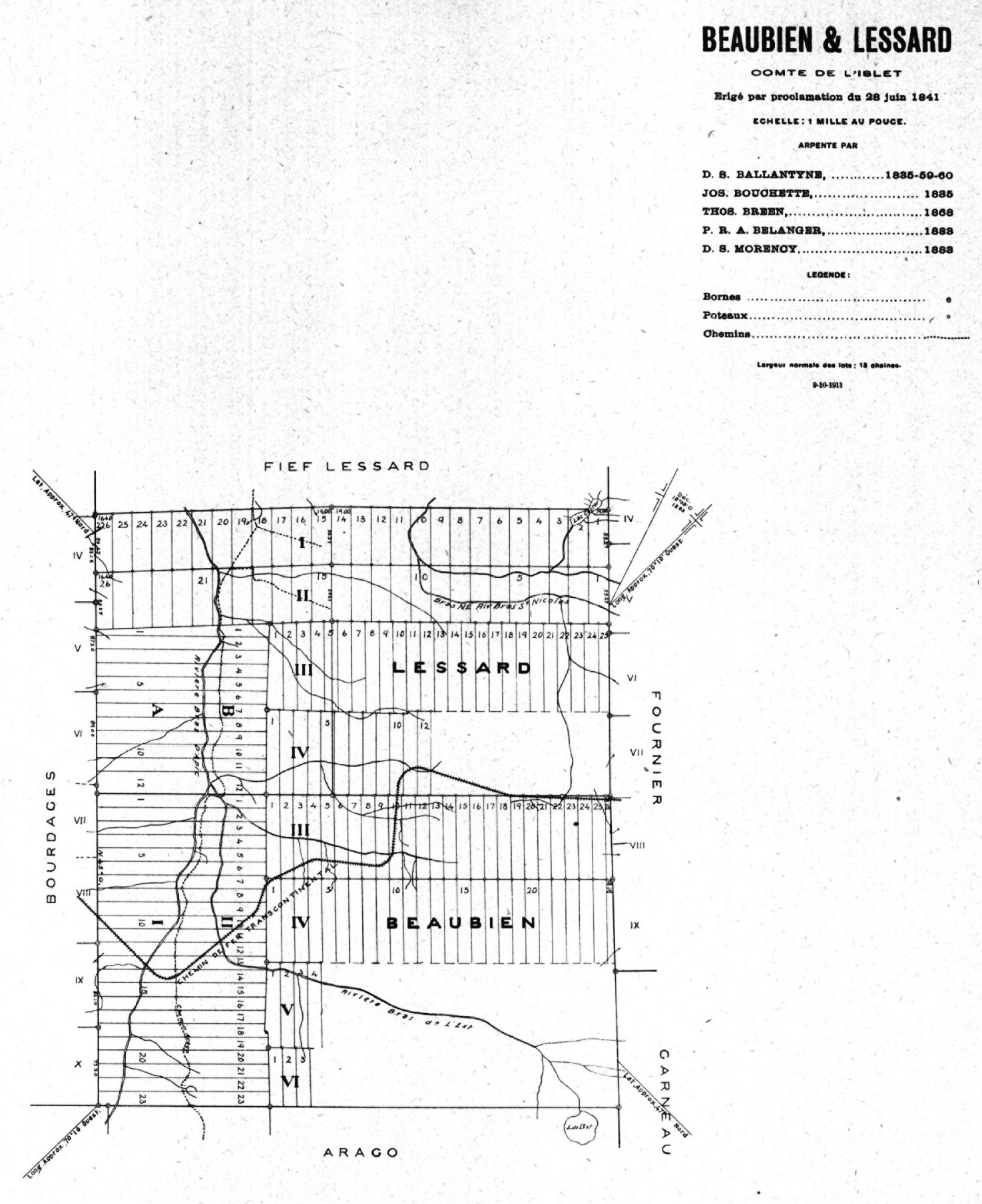 Cartes cadastrales de cantons du Québec, avec indication du nom des arpenteurs Comté de L'Islet Beaubien & Lessard, Beaubien & Lessard